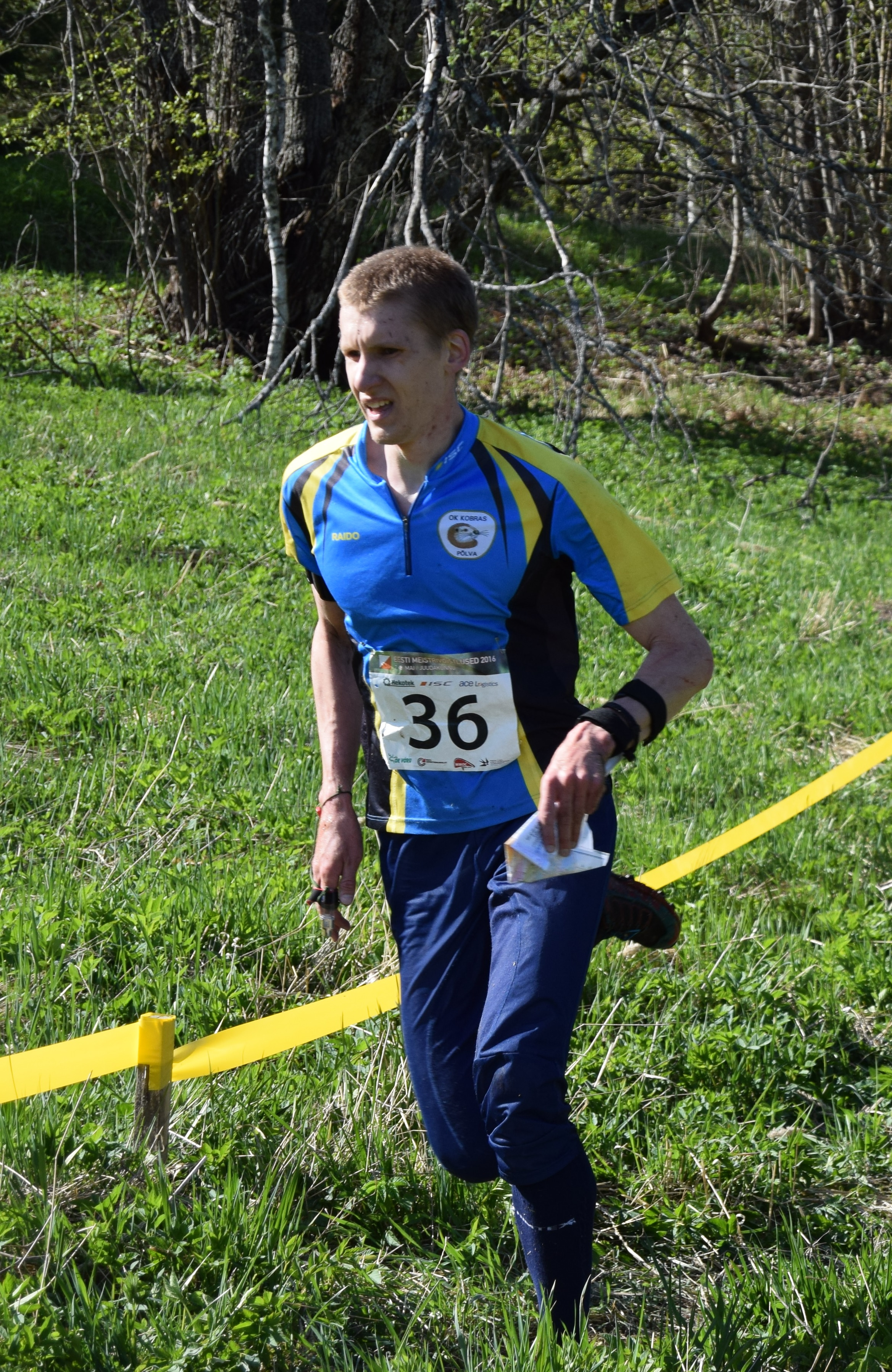 Raido Mitt 2016